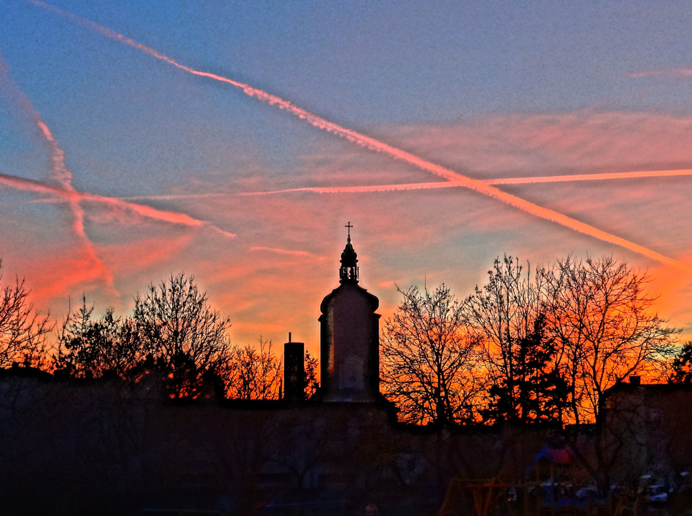 Kościół Matki Boskiej Nieustającej Pomocy w Bydgoszczy na os. Szwederowo, zbud. 1928 r.